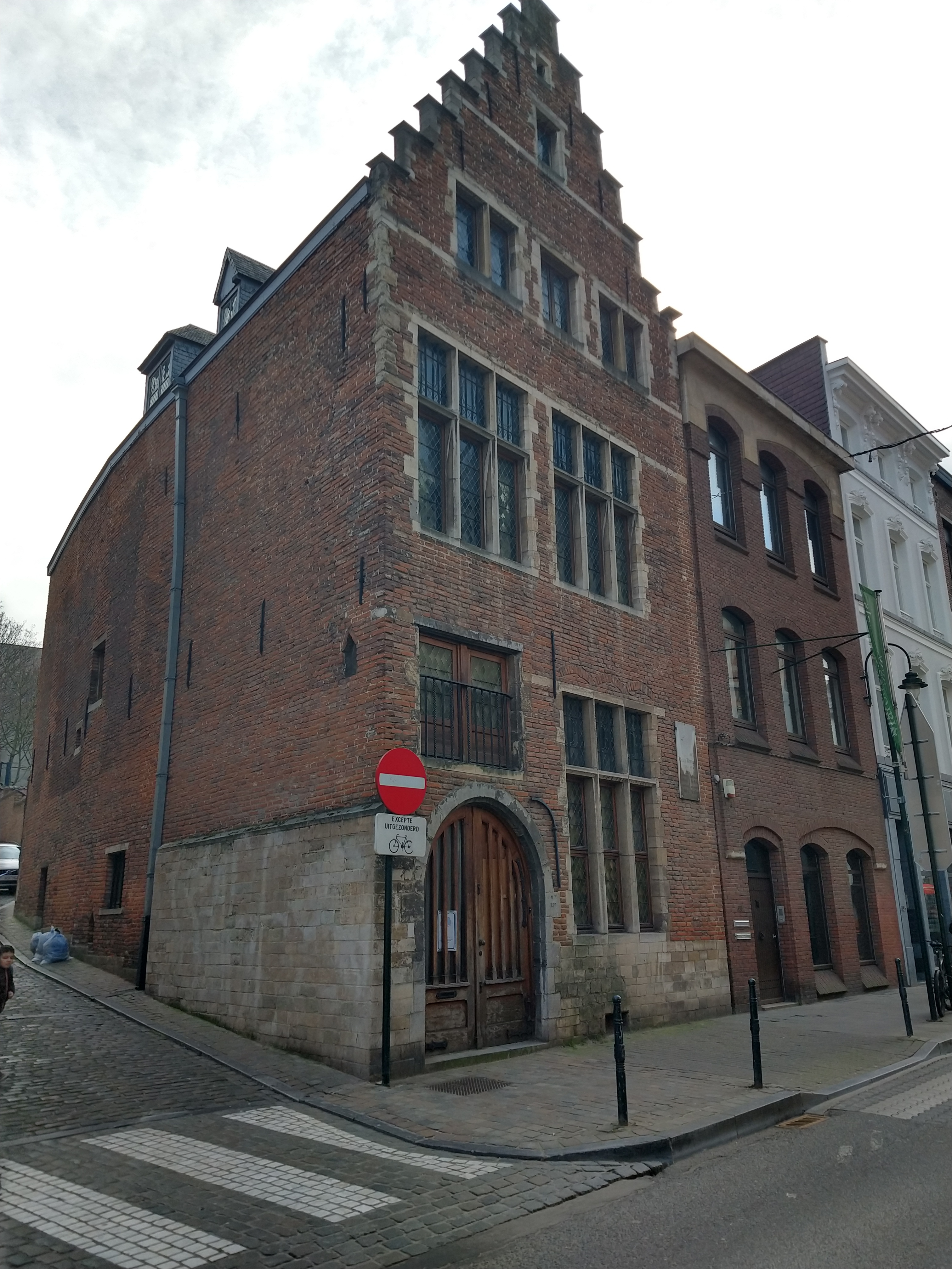 Gevel van het Bruegelhuis in Brussel